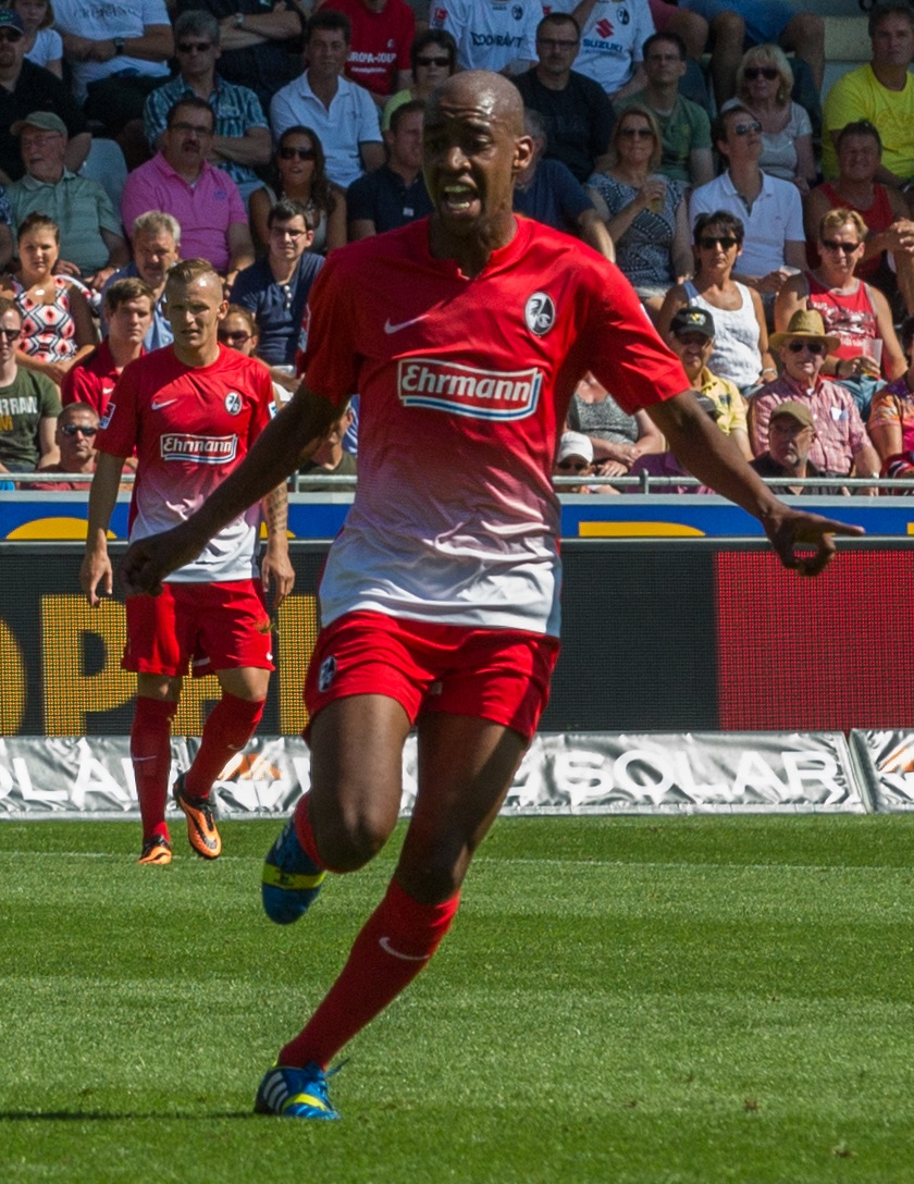 Gelson Fernandes am 2. Spieltag der Saison 2013/14 (17. August 2013).